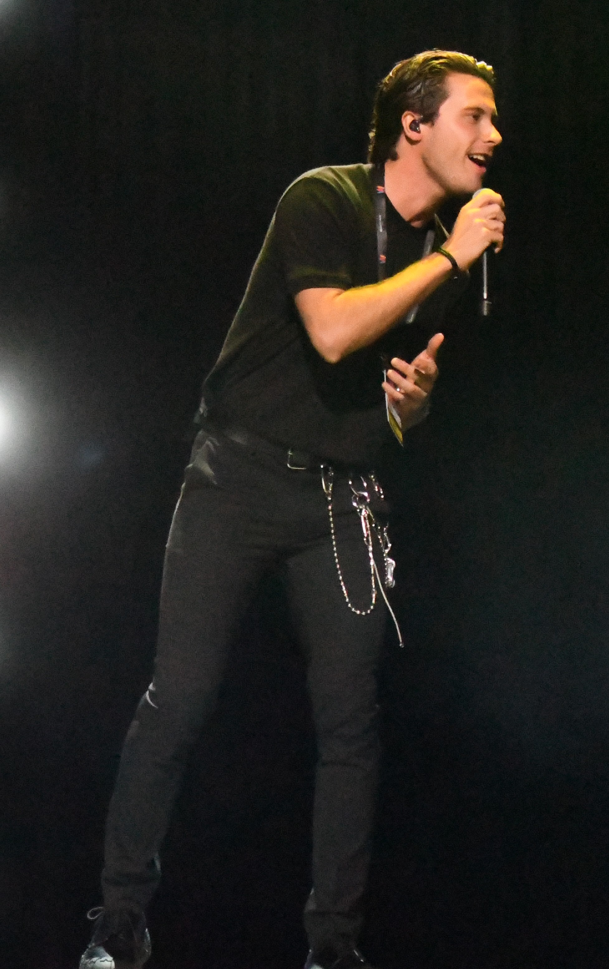 Melodifestivalen 2020, Malmö, Deltävling 4, Repetition fredag, Melodi nr 4 Troubled Waters, Victor Crone